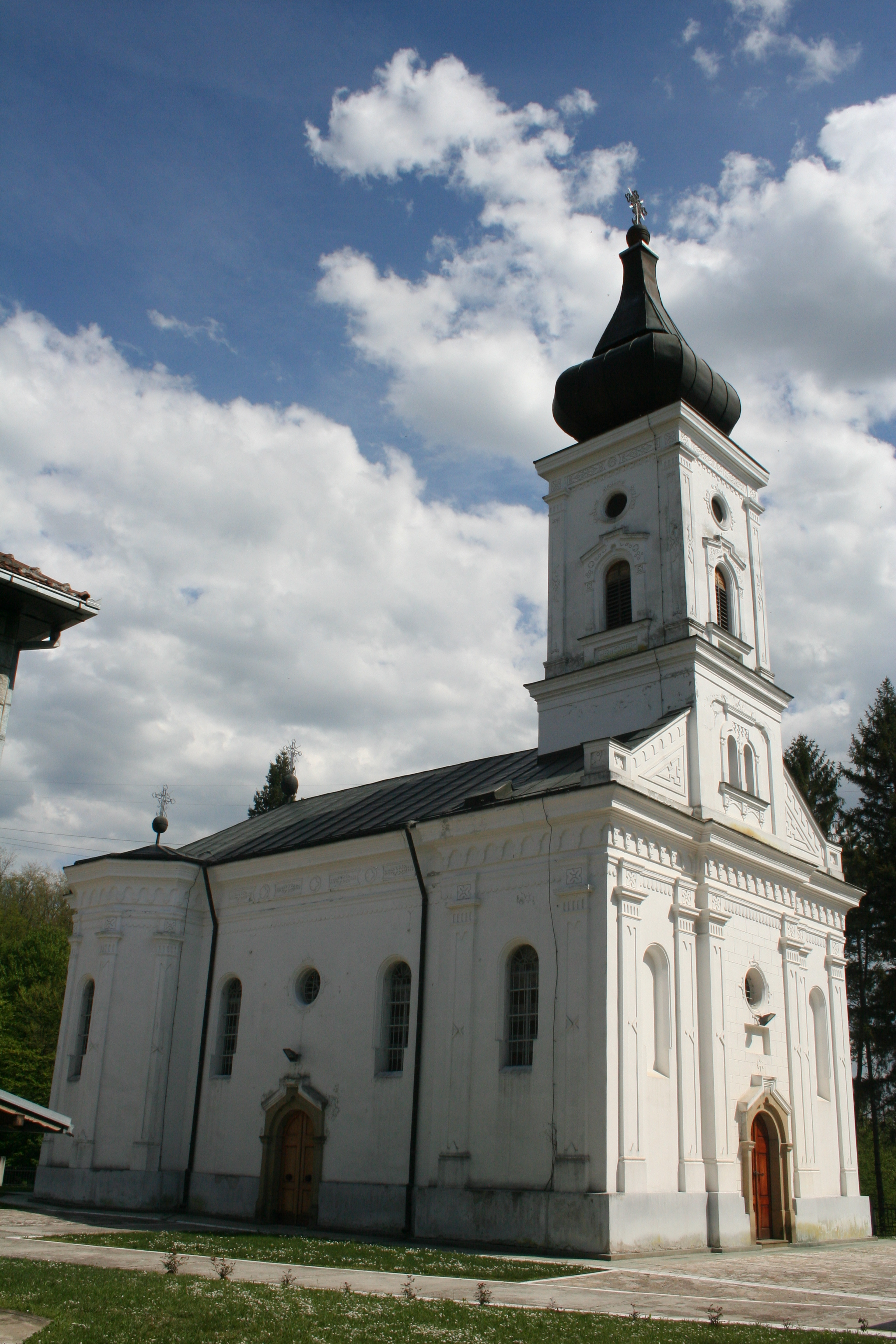 Crkva Sv. Nikole-Rabrovica, Divci